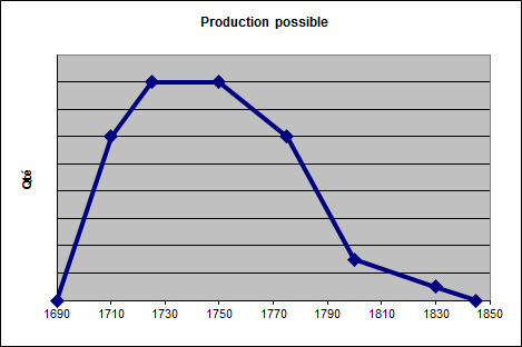 Evolution possible de production.